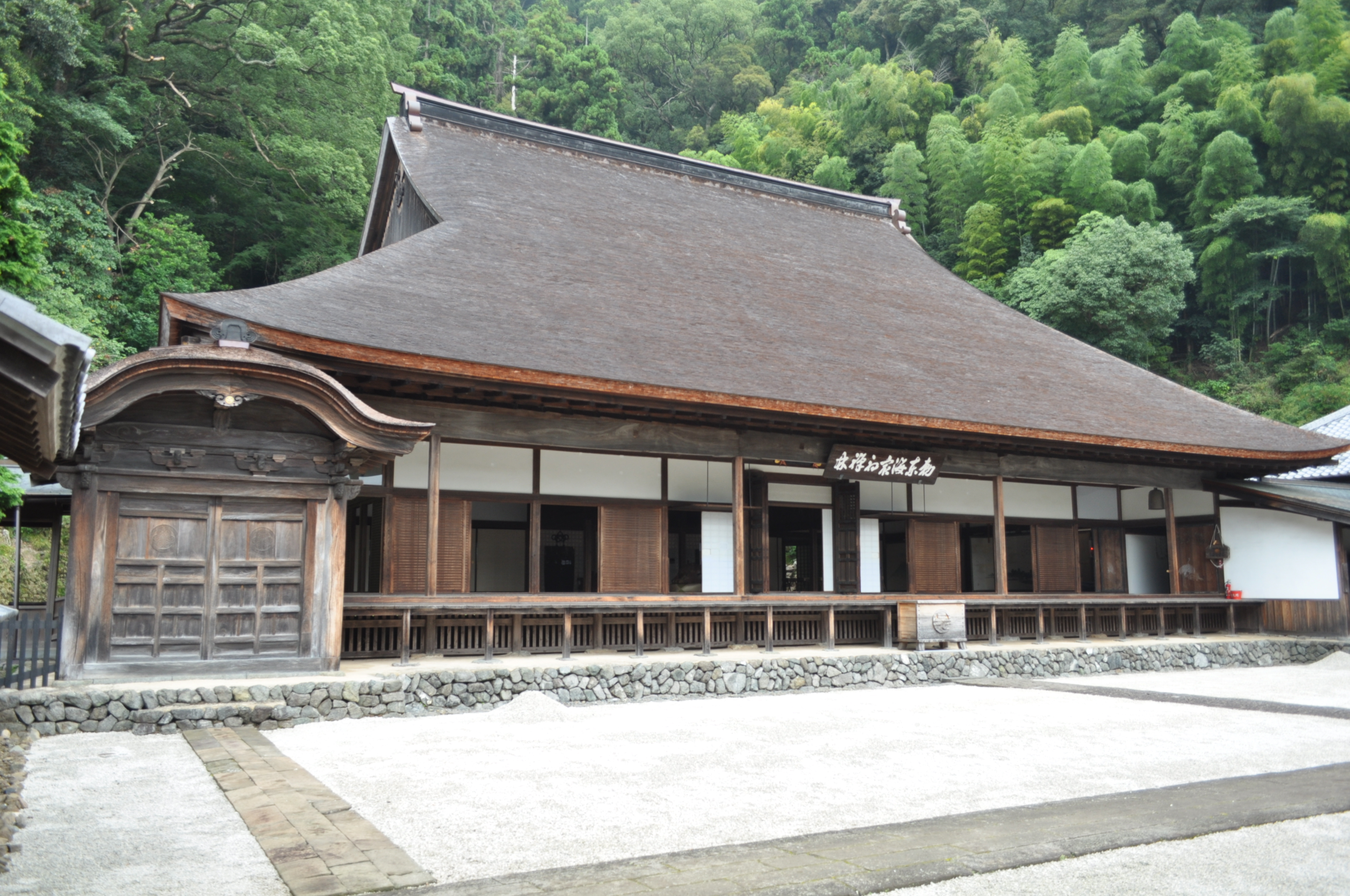 臨済寺（静岡市）